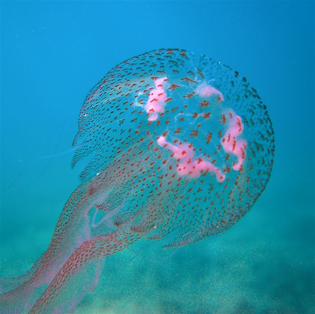 Area Marina Protetta Capo Gallo, Palermo, Sicily Pelagia noctiluca